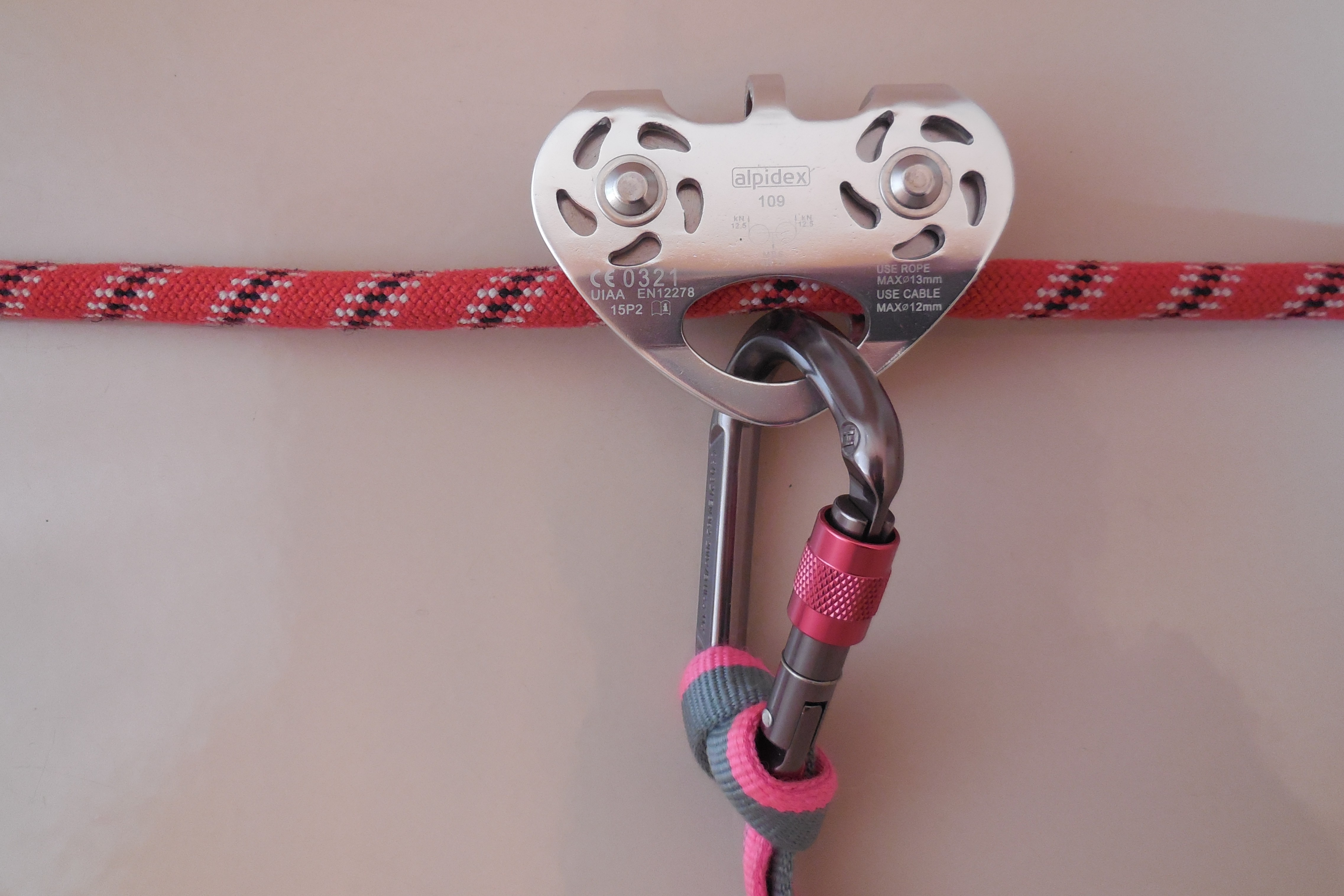 Seilbahn mit Doppelseiprolle, Schraubkarabiner und Schlinge.